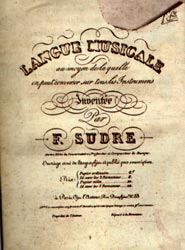 Обложка книги Сюдра о сольресоле, вышедшей в середине XIX века.